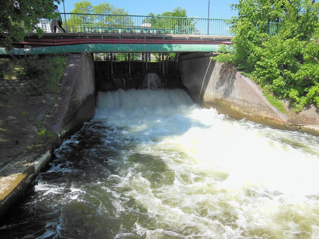 Jaz Ulgowy na Wyspie Młyńskiej w Bydgoszczy